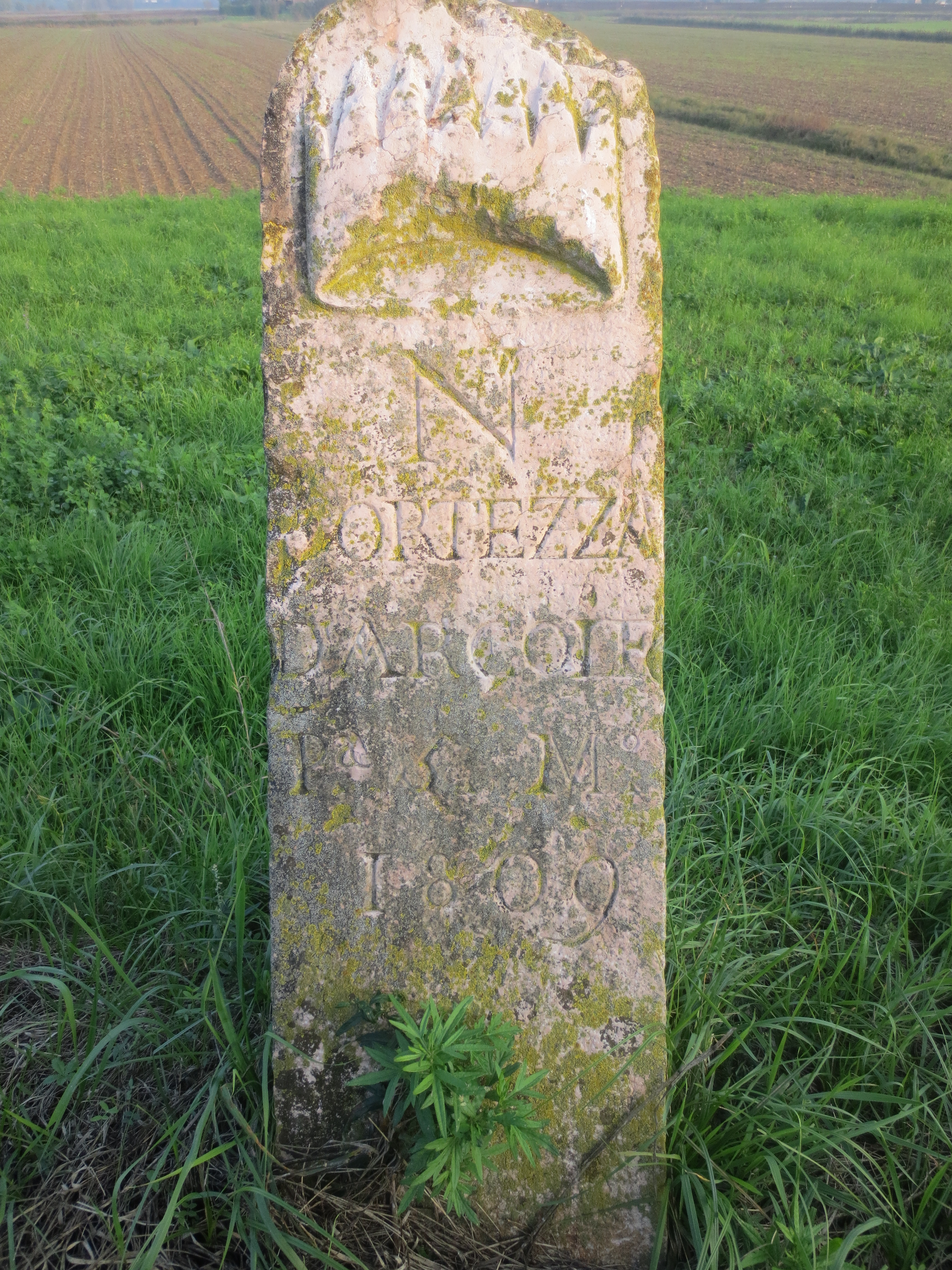 Cippo a memoria della battaglia napoleonica di Arcole